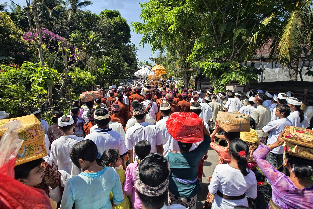 temple ceremony